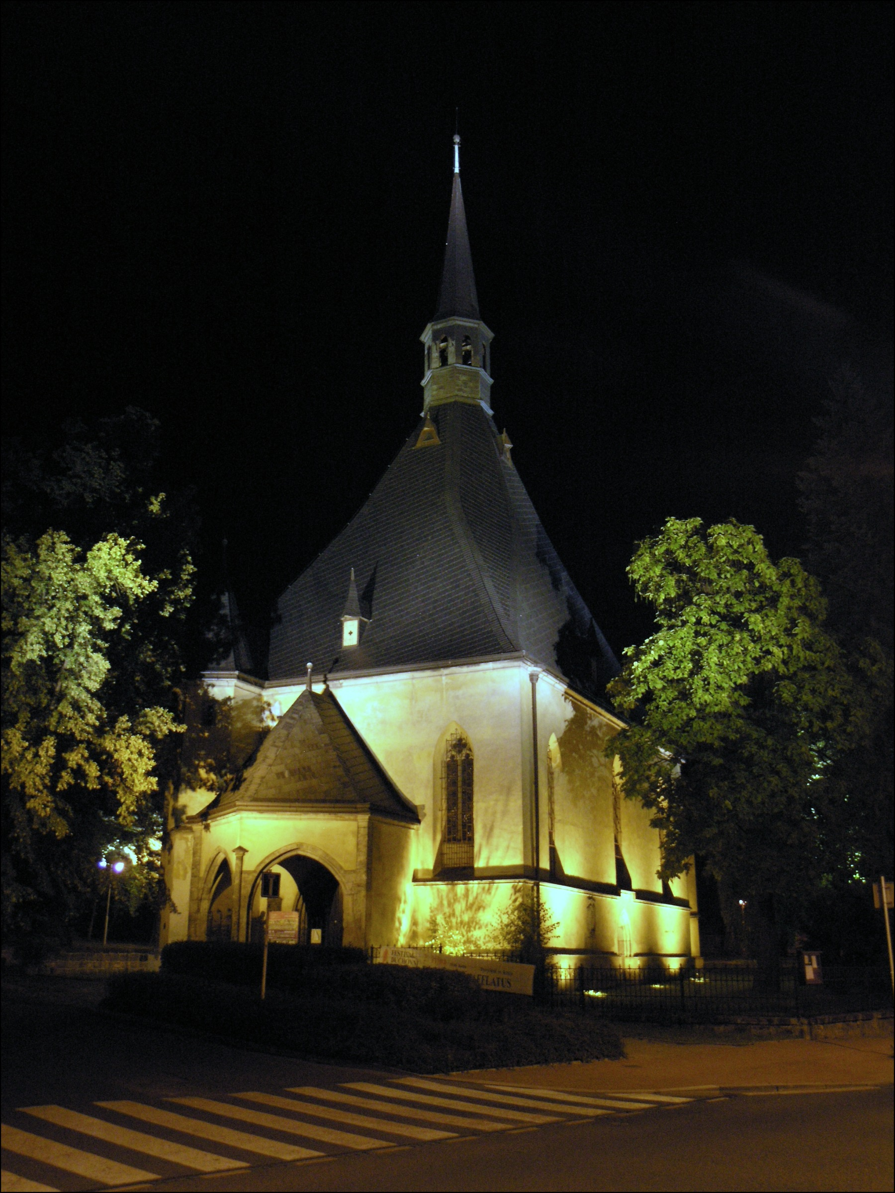 Česká Lípa - kostel Povýšení sv. Kříže